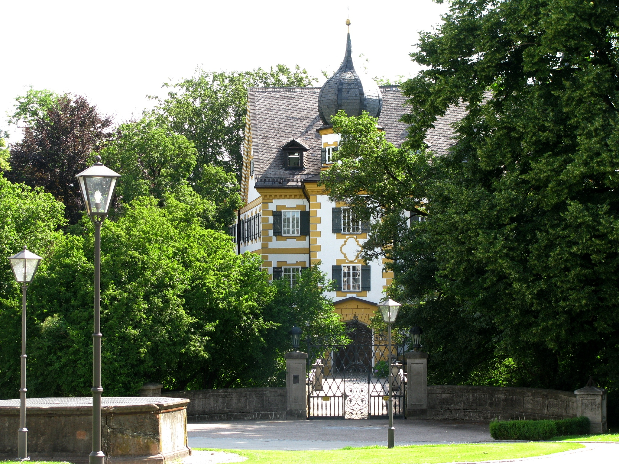 Schloss Wildenwart, Zufahrt